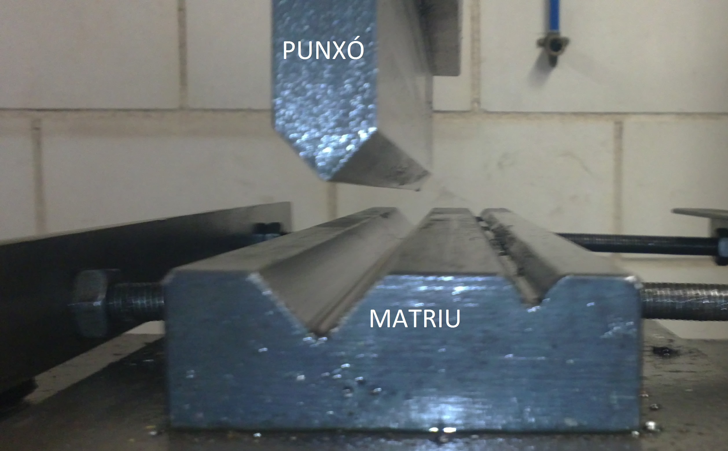 Matriu y punxó d'una prensa